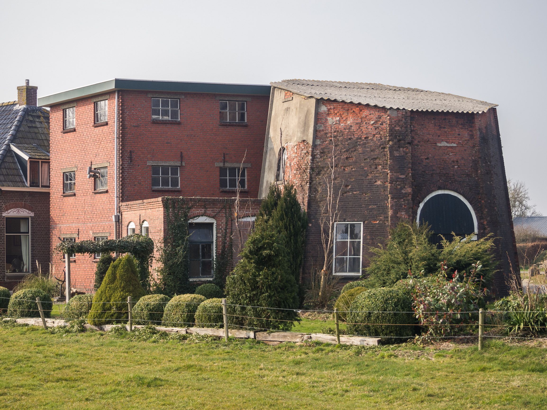 Restanten van Korenmolen de Hoop 1908-1922 in Oudega